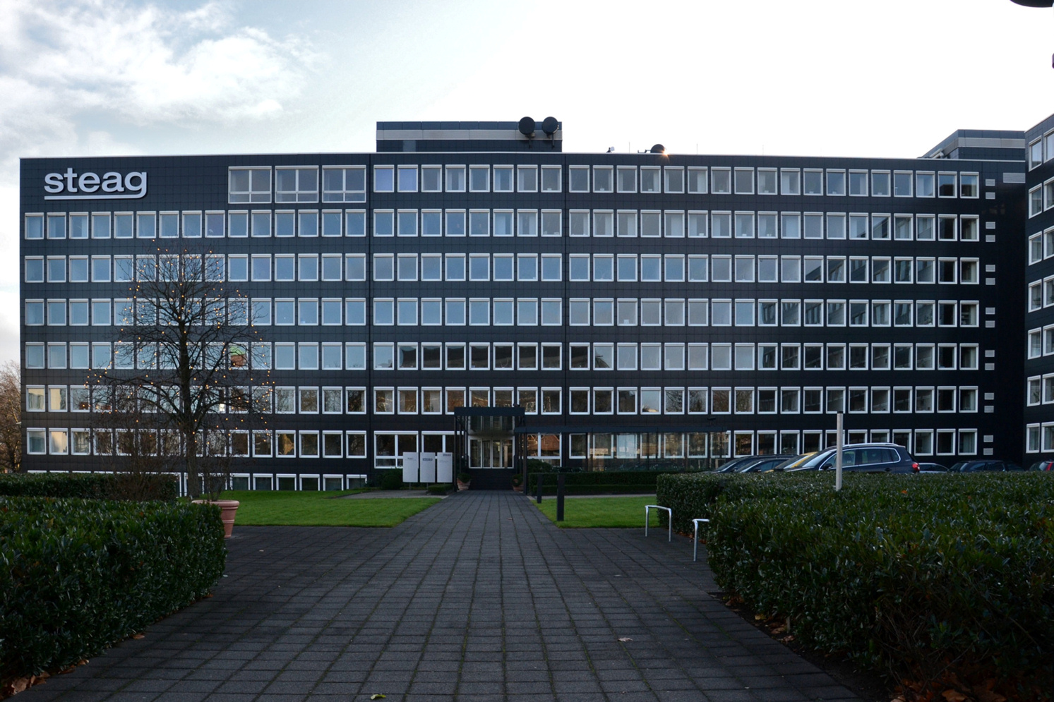 Verwaltungsgebäude Ruhrkohle in Essen, unter Denkmalschutz